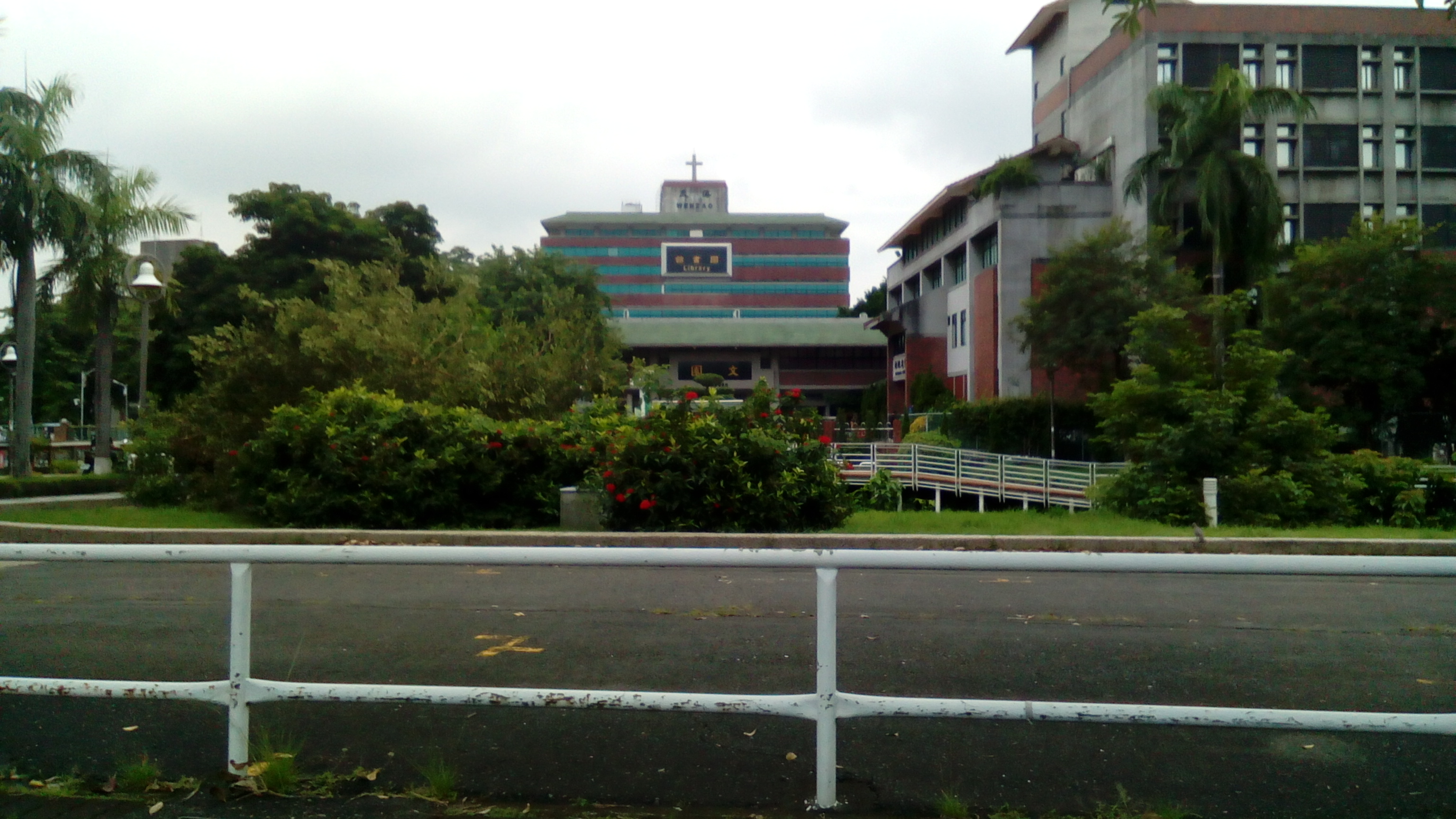 攝於台1線三民段旁